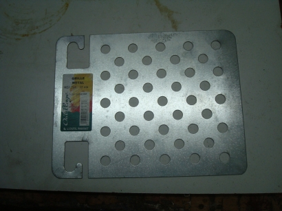 Tôle perforée obtenue par poinçonnage.